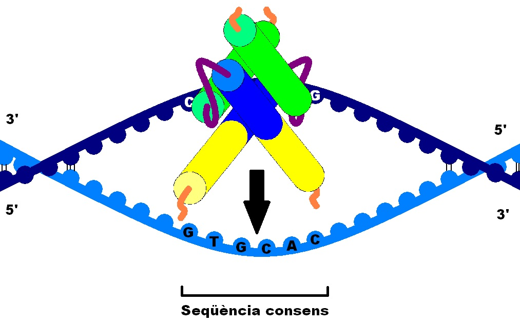 Simplificació de la unio del domini bHLH de twist a la seqüència consens de l'ADN